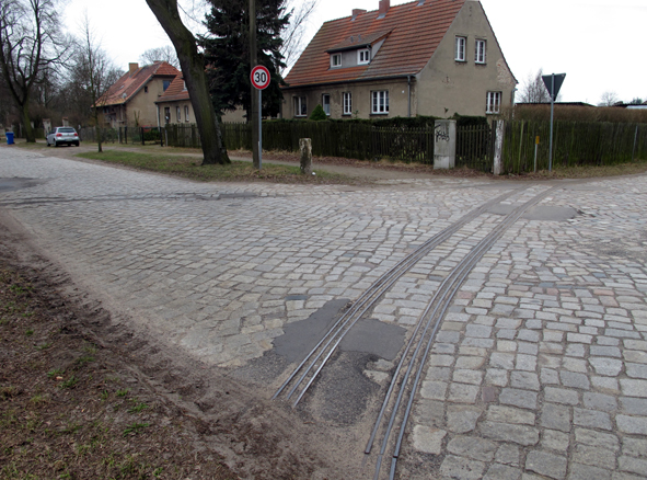 Hobrechtsfelde, Reste des ab 1906 betriebenen Feldbahnnetzes auf der Hobrechtsfelder Dorfstrasse